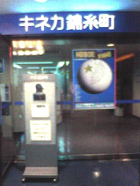 キネカ錦糸町 劇場入口（1990年当時）